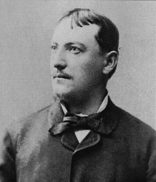 Árkay Aladár fényképe